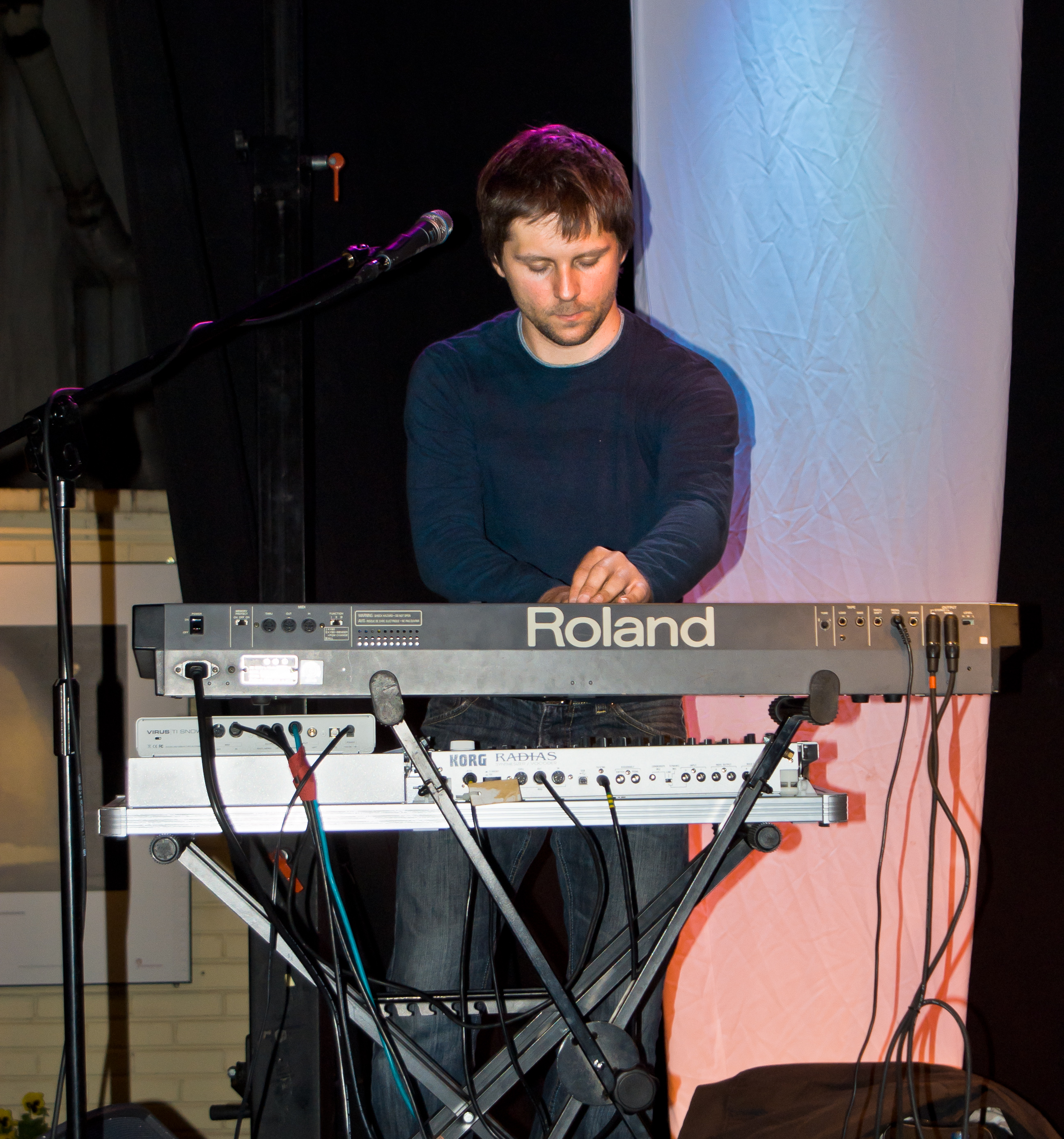 Bartłomiej Lewczuk, klawiszowiec zespołu Uniqplan podczas koncertu w Galerii Jabłkowskich w Warszawie, Noc Muzeów 2011, Warszawa.